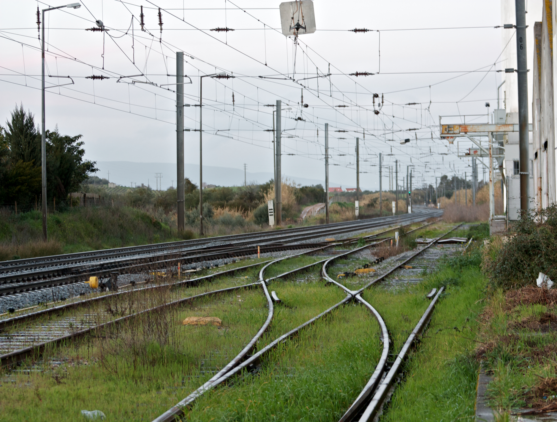 Via férrea: Ramal Vale de Figueira • EPAC [Ramal de Estação] Local: Estação de Vale de Figueira [Linha do Norte, PK 83] Data e hora: 15 de Fevereiro de 2011 [18h15]